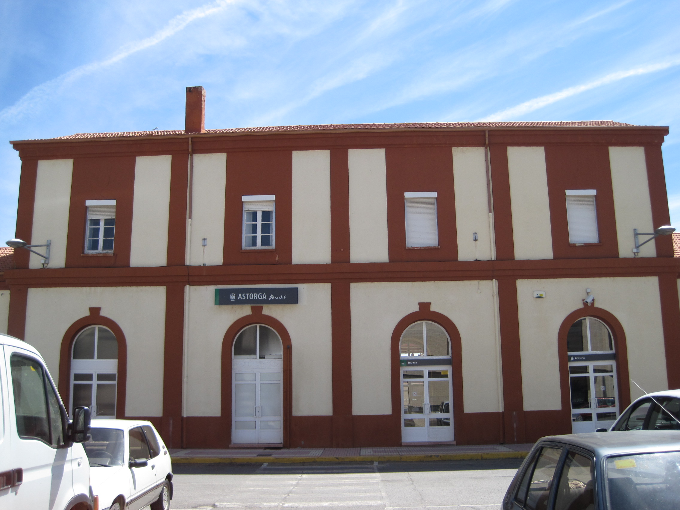 Fachada del edificio de la estación de ferrocarril de Astorga (León, España).